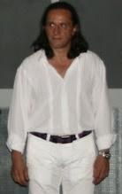 Claudiu Bleonţ la lansarea filmului Calatoria Lui Gruber.